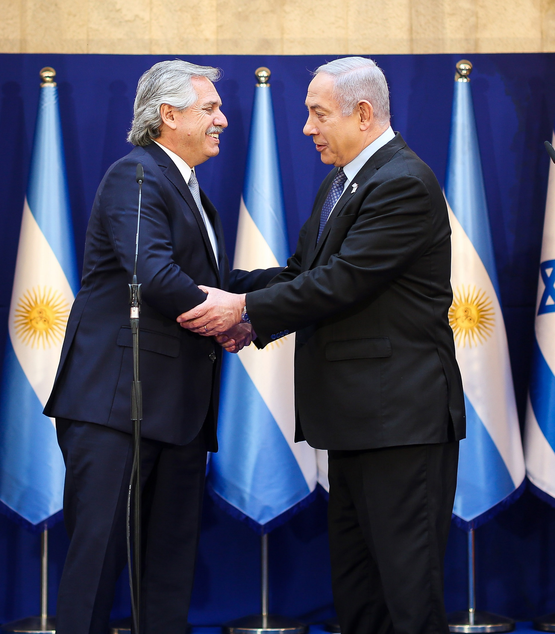 El presidente Alberto Fernández y el primer ministro de Israel, Benjamin Netanyahu, mantuvieron un encuentro esta mañana en Jerusalén y brindaron una declaración conjunta acompañados por sus respectivas esposas, Fabiola Yáñez y Sara Netanyahu.